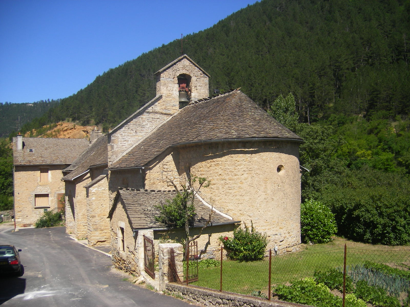 Balsièges